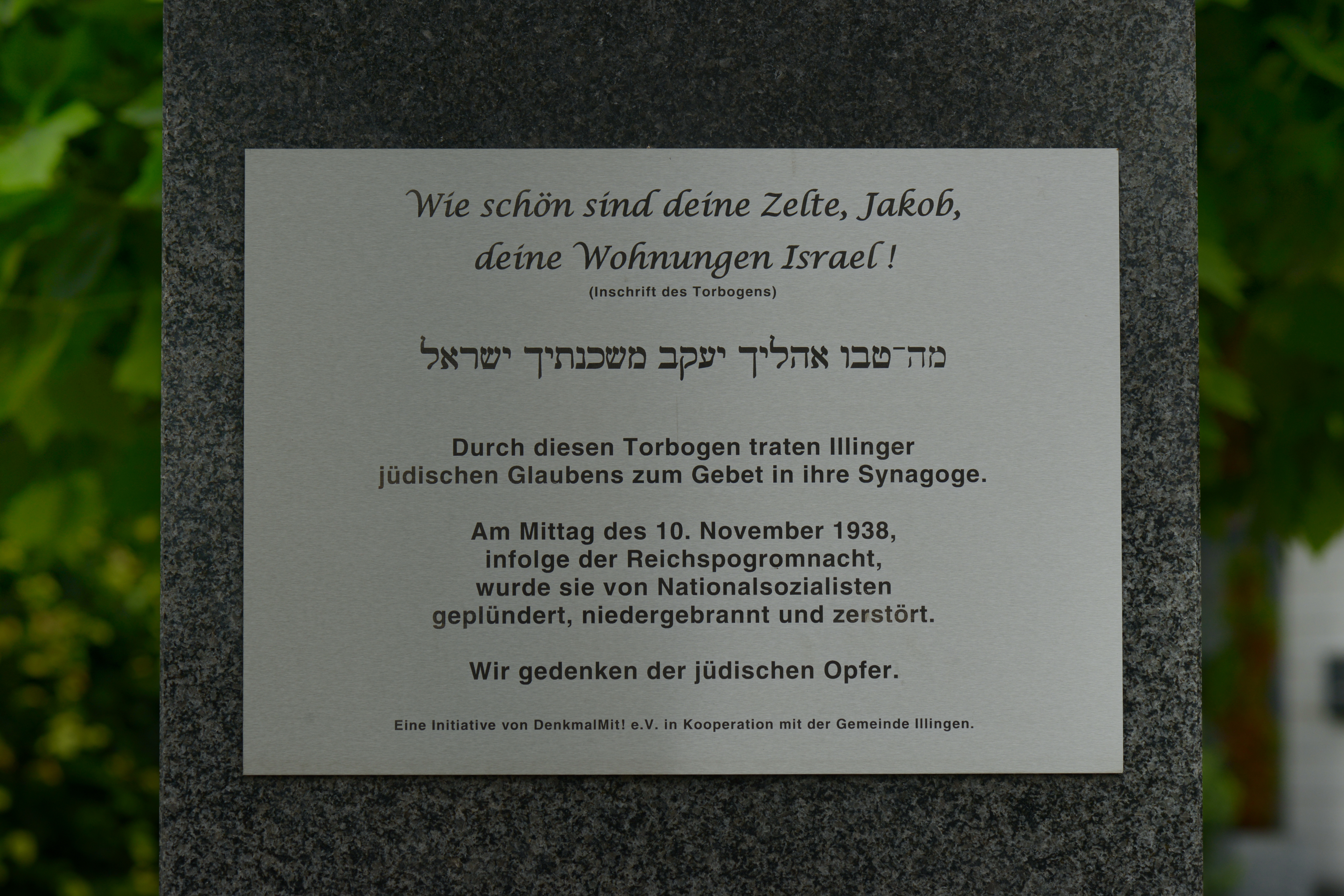 Hinweistafel am Torbogen der ehemaligen Synagoge in Illingen, Saarland. Die Tafel ist an der linken Marmorstele angebracht.